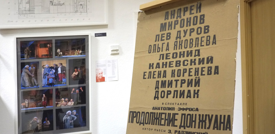 Музей в театре на Малой Бронной